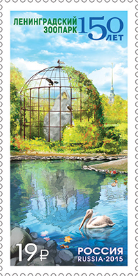 150 лет Ленинградскому зоопарку